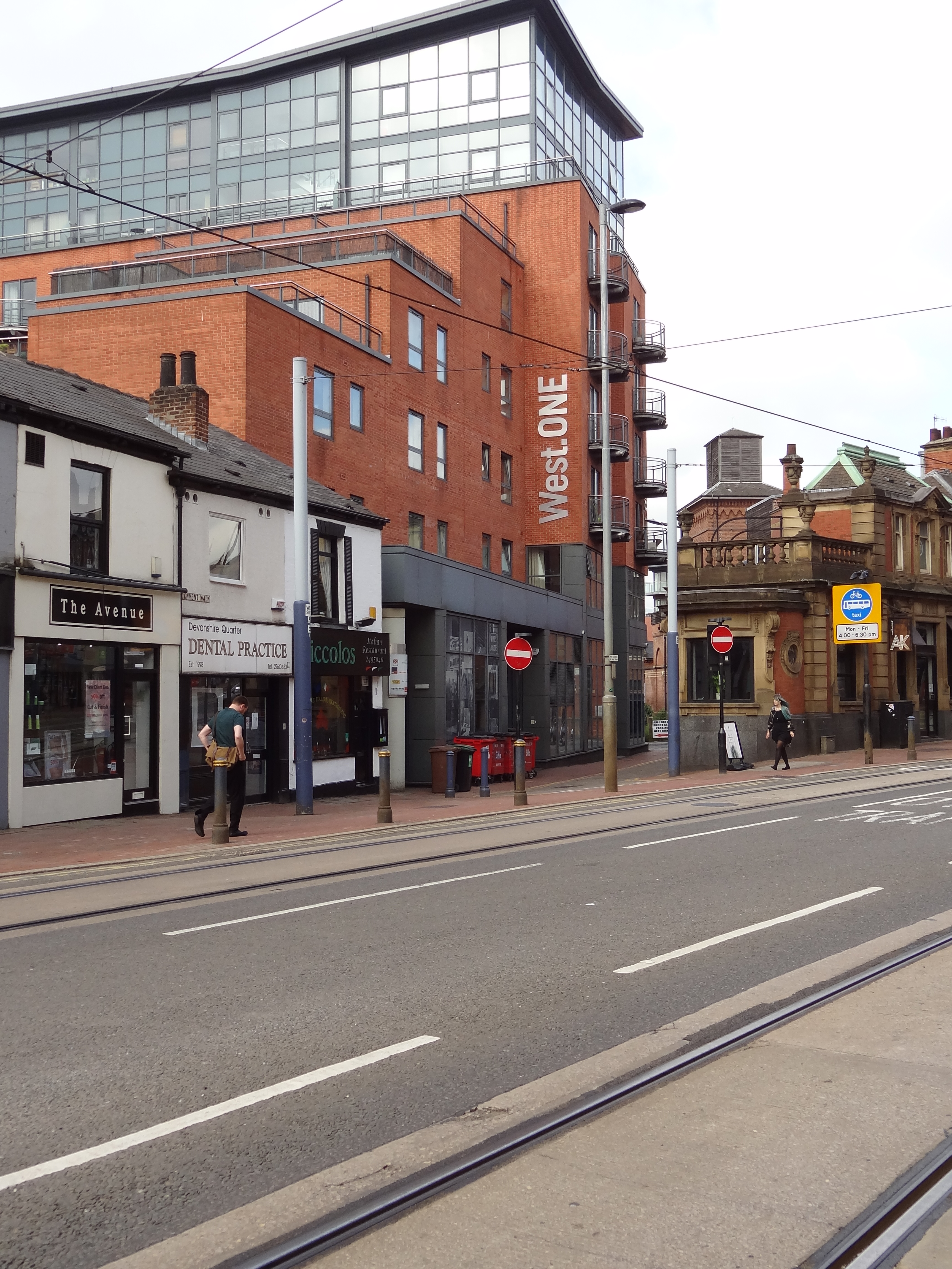 West One